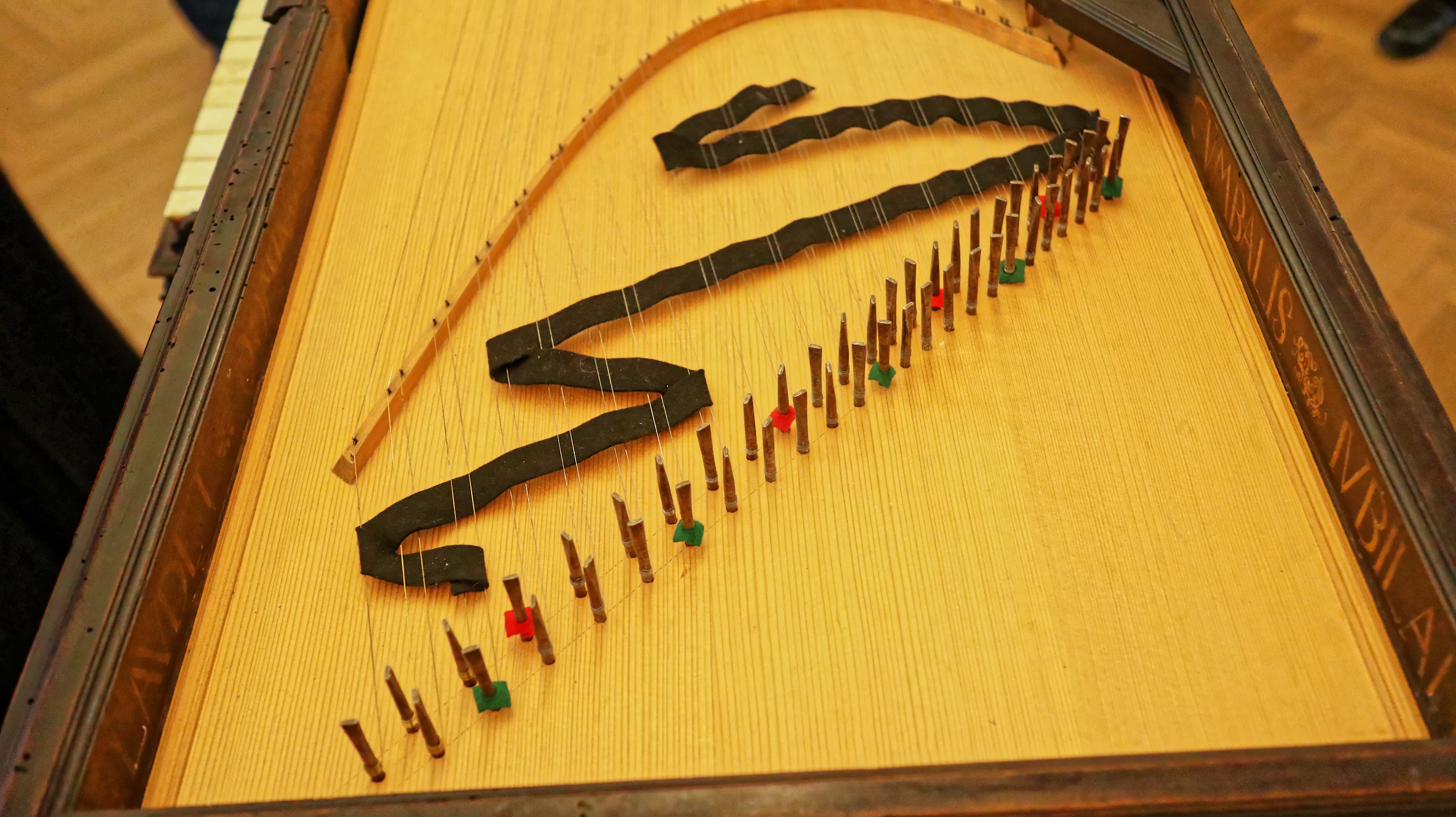 Wikipedianrinnen und Wikipedianer im Dommuseum. Im Mittelpunkt steht das Claviorganum. Claviorgana waren in der Renaissance, vor allem im ausgehenden 16. Jahrhundert, sehr beliebt. Funktionsfähig sind nur wenige geblieben, das wohl älteste noch spielbare Instrument ist das Claviorganum des Josua Pock, „Orgelmacher(s) zu Insprug“, aus dem Jahr 1591. Es ist das einzige Musikinstrument, das sich laut den Inventaren aus der Regierungszeit von Fürsterzbischof Wolf Dietrichs von Raitenau (1587-1612) in der Salzburger Residenz befunden hat.